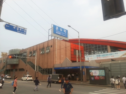 온수역. 서울특별시 구로구 온수동 51-7 1호선 온수역(도로명주소：서울특별시 구로구 부일로 872)